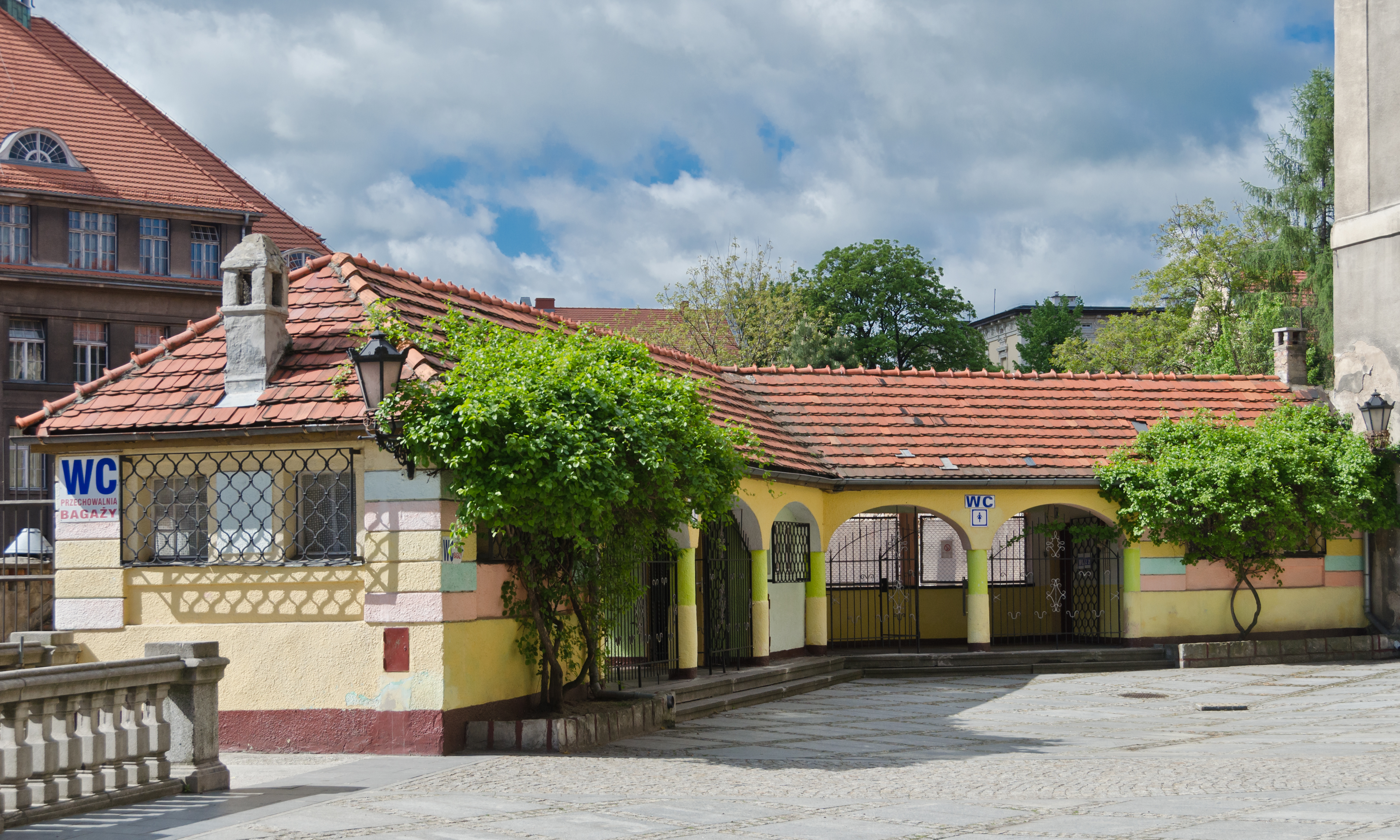 Kłodzko, historyczny układ urbanistyczny - ośrodek historyczny miasta Kłodzko z zachowanymi niekompletnie miejskimi murami obronnymi wraz ze średniowiecznym mostem i wyspą Piasek